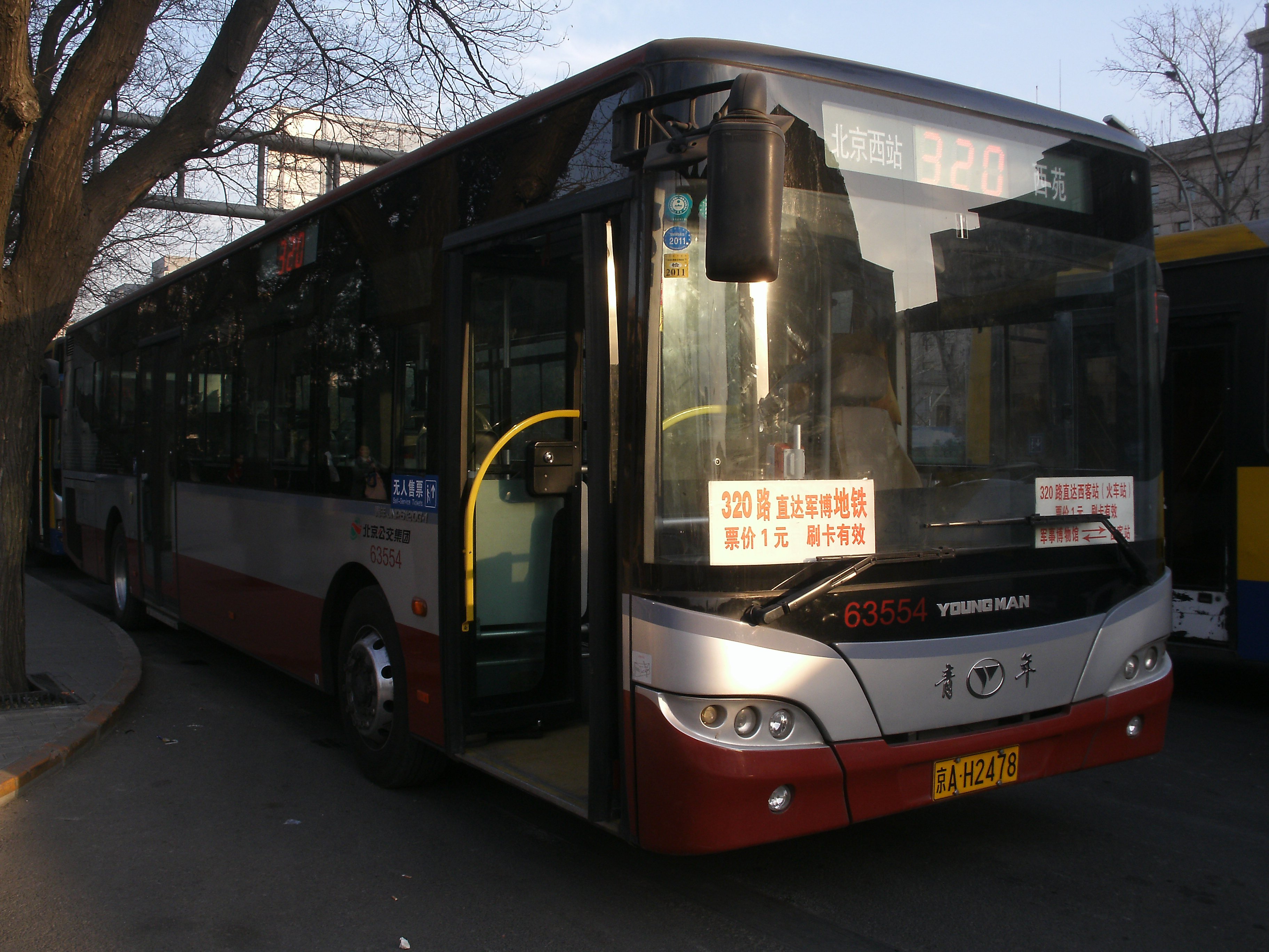 中文（中国大陆）: 北京公交320路军事博物馆区间车